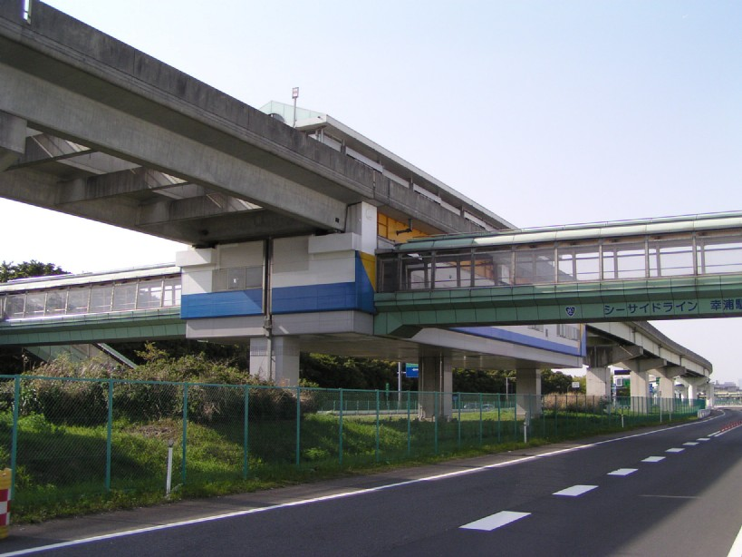 2005年4月17日に投稿者がja:幸浦駅で撮影。